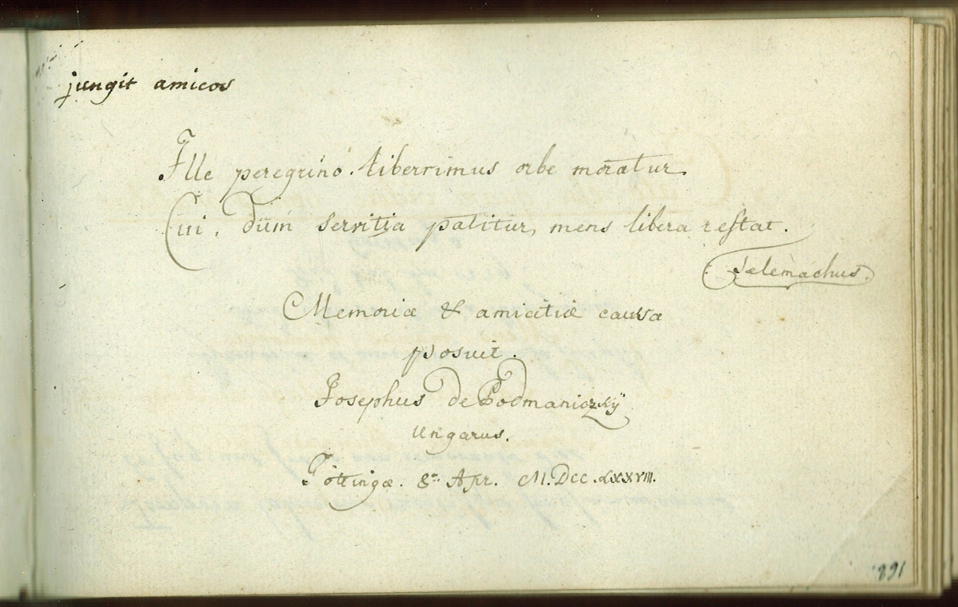 Stammbuch des Johan David af Sandeberg. Eintrag des József Podmaniczky am 8. April 1778 in Göttingen.